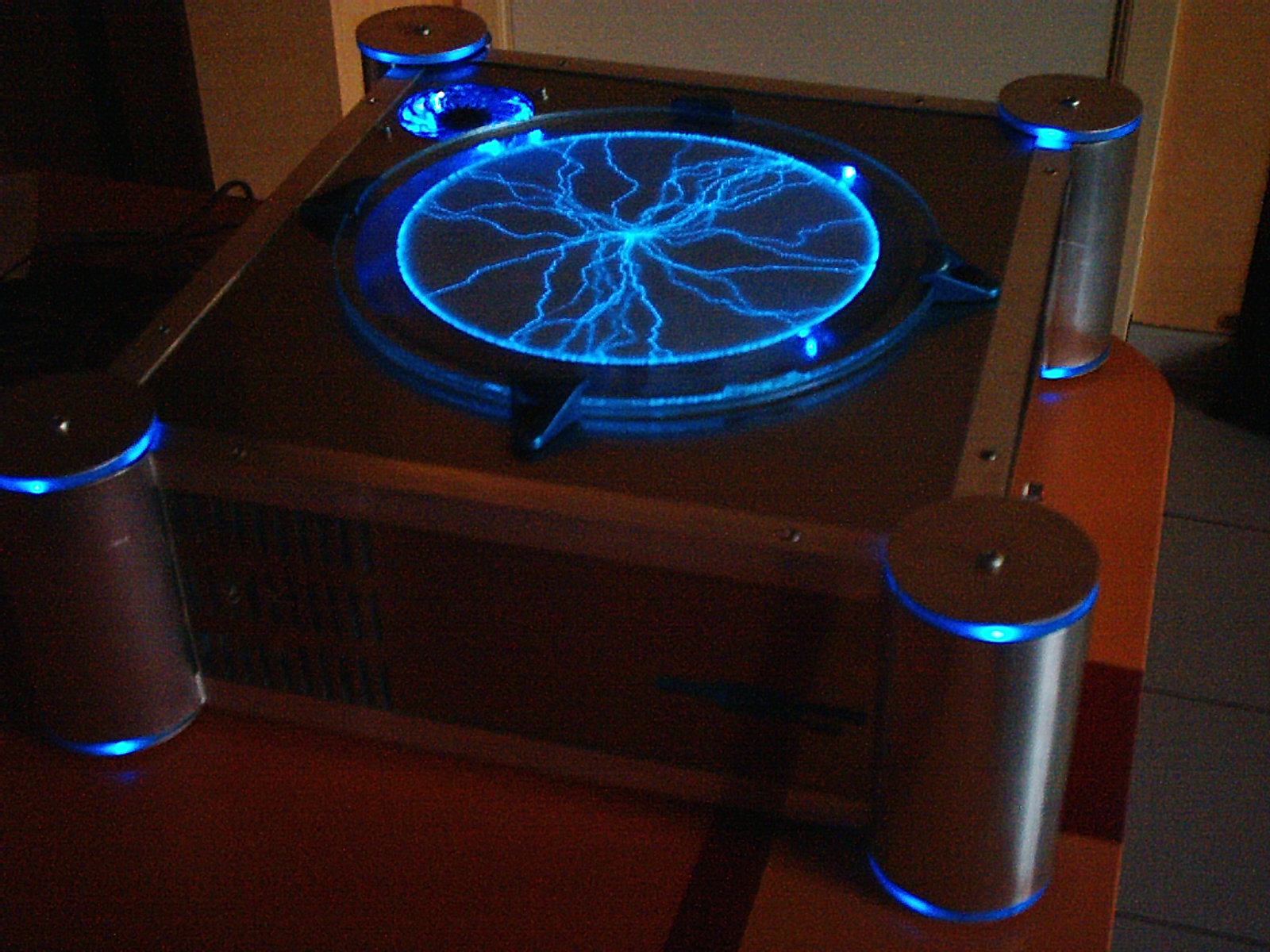 Premodded kast